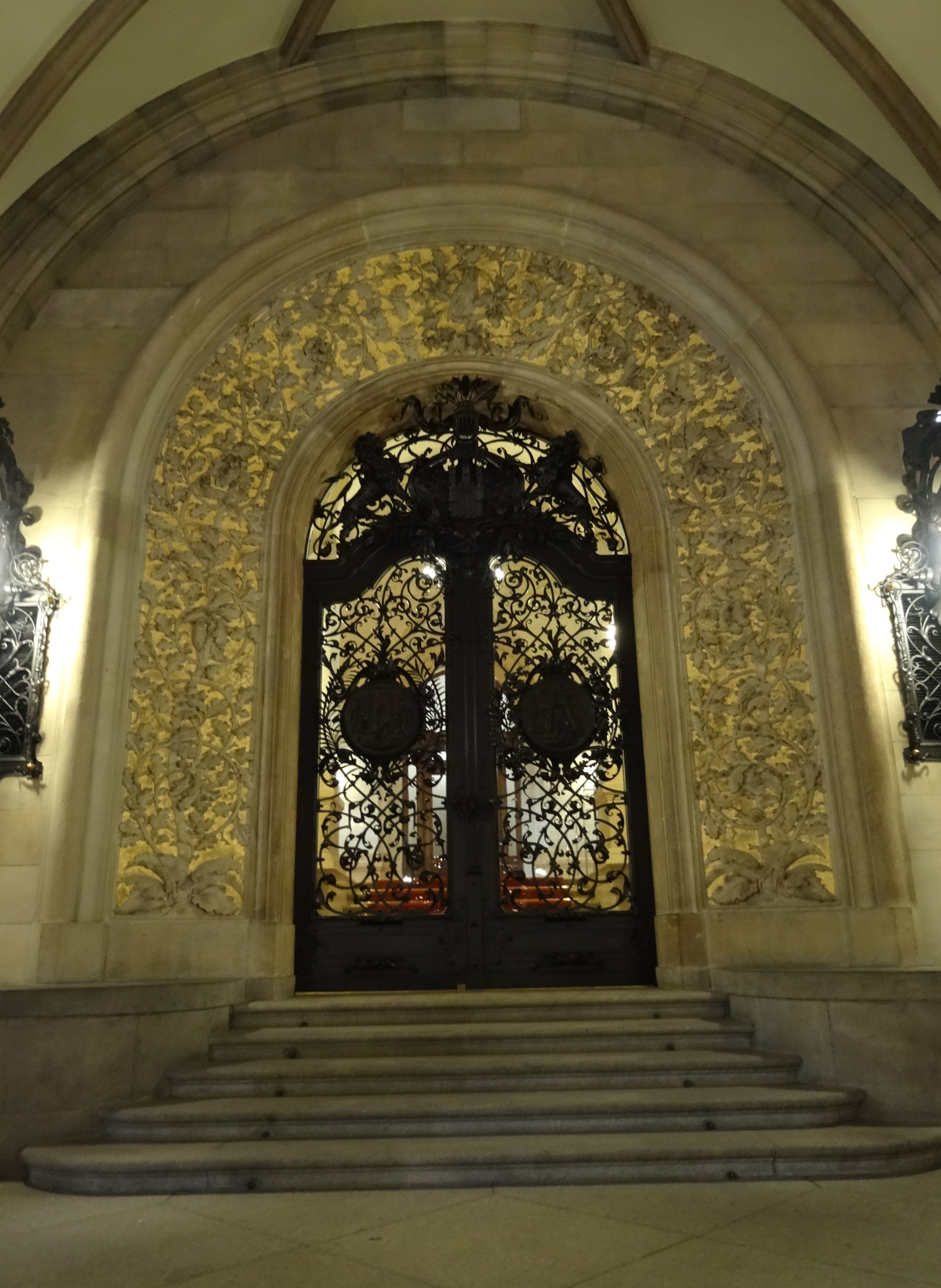 Ein zusätzlicher Schmuck um das schmiedeeiserne Tor zum Senatstreppenhaus ist das goldene gobelinähnliche "Gewände" aus Sandstein von dem Bildhauer Karl Börner (1828-1905)